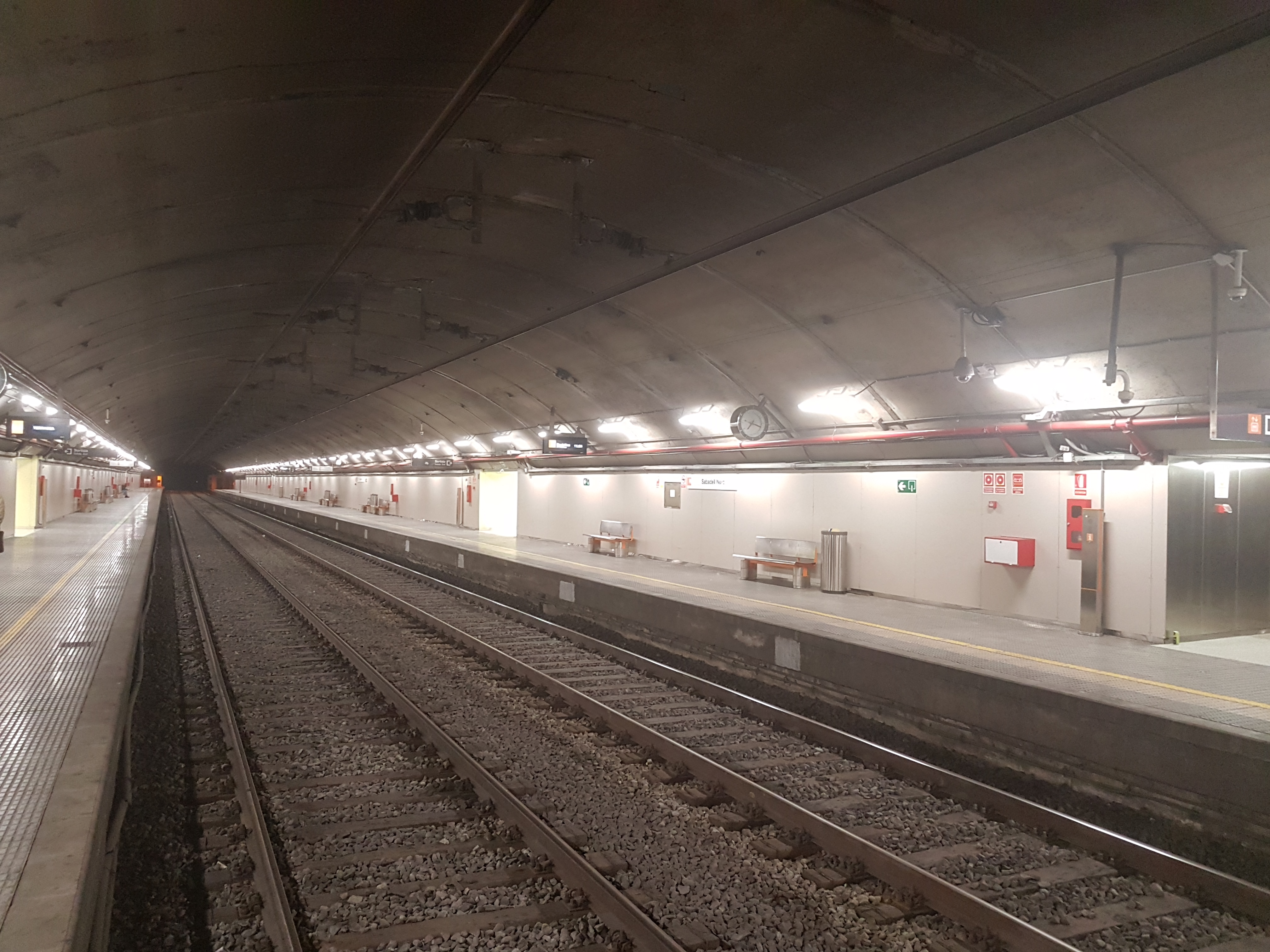 Estació de Sabadell Nord de la línia Barcelona-Manresa-Lleida